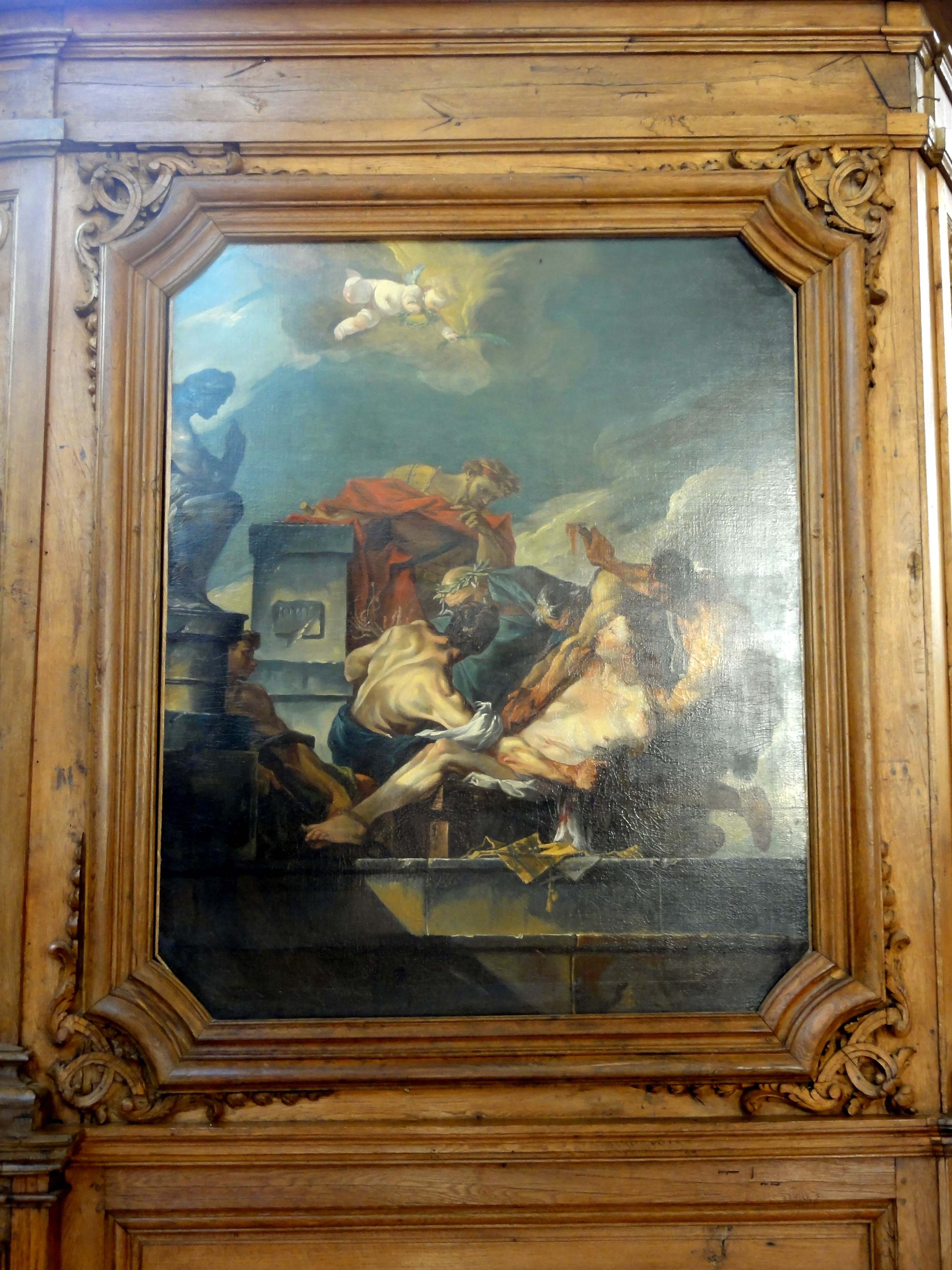 Cycle du martyre de saint Vincent de Saragosse en six tableaux, non datés. Attribution selon Sylvain Kerspern.